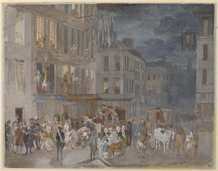 Henri-Joseph Van Blarenberghe (Français, 1741-1826) : Descente de police la nuit